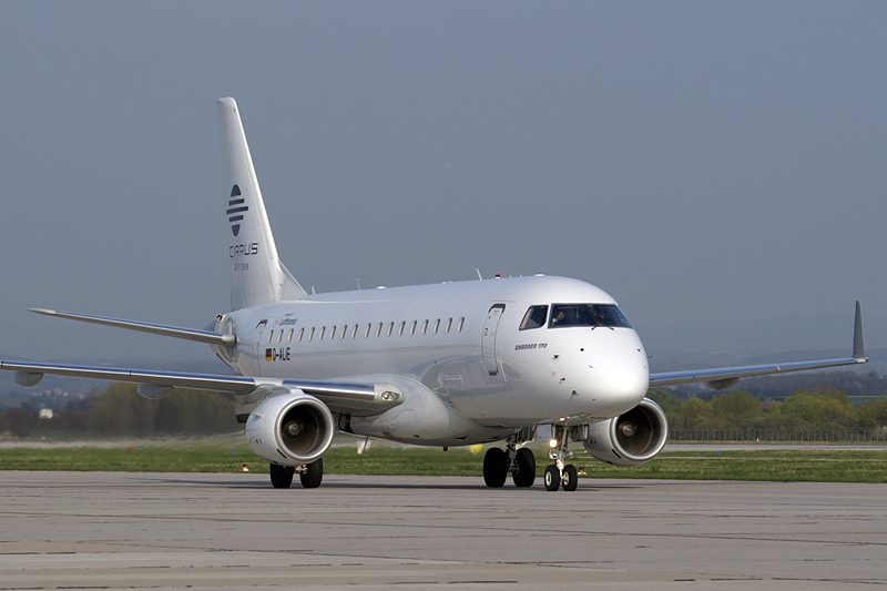 Cirrus Airlines Embraer 170 D-ALIE